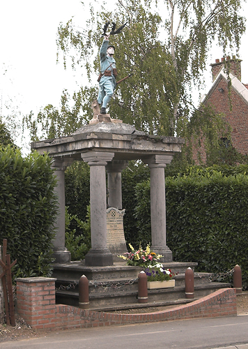 Monument aux morts de Boursies, Nord. Photo M. Lefrancq, Mons.